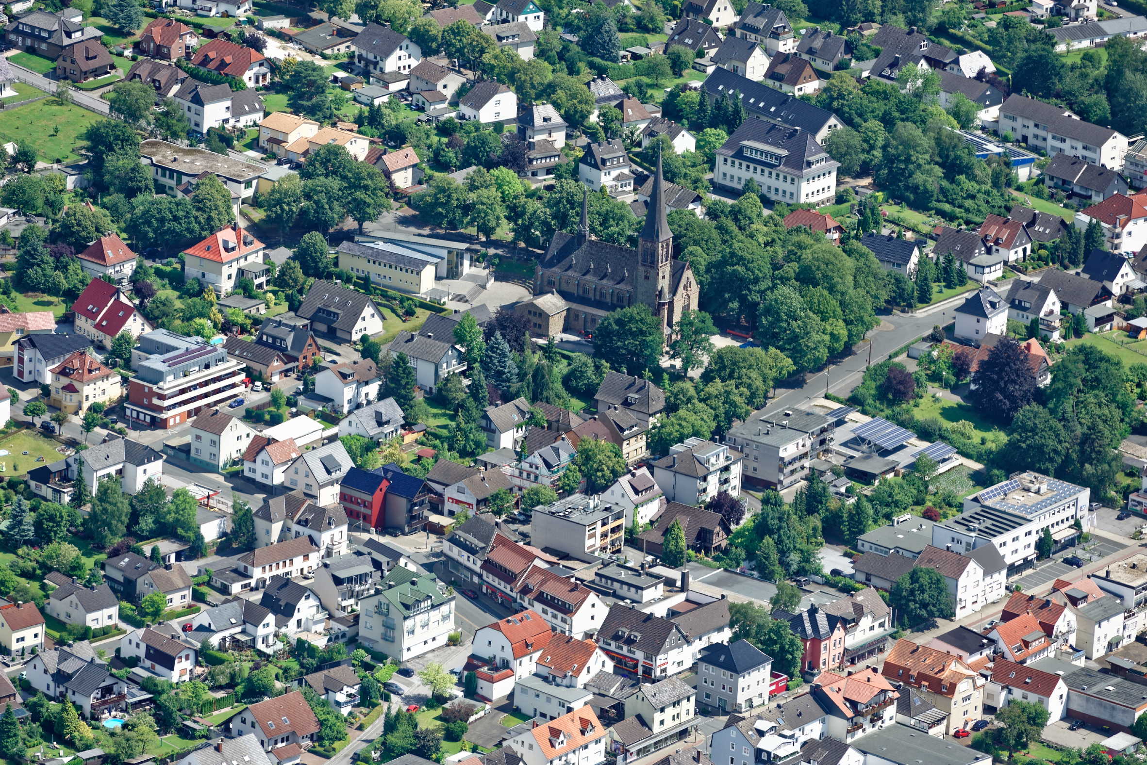 Fotoflug Sauerland West. Luftaufnahme: Menden-Lendringsen mit St. Joseph Kirche, Nordrhein-Westfalen.